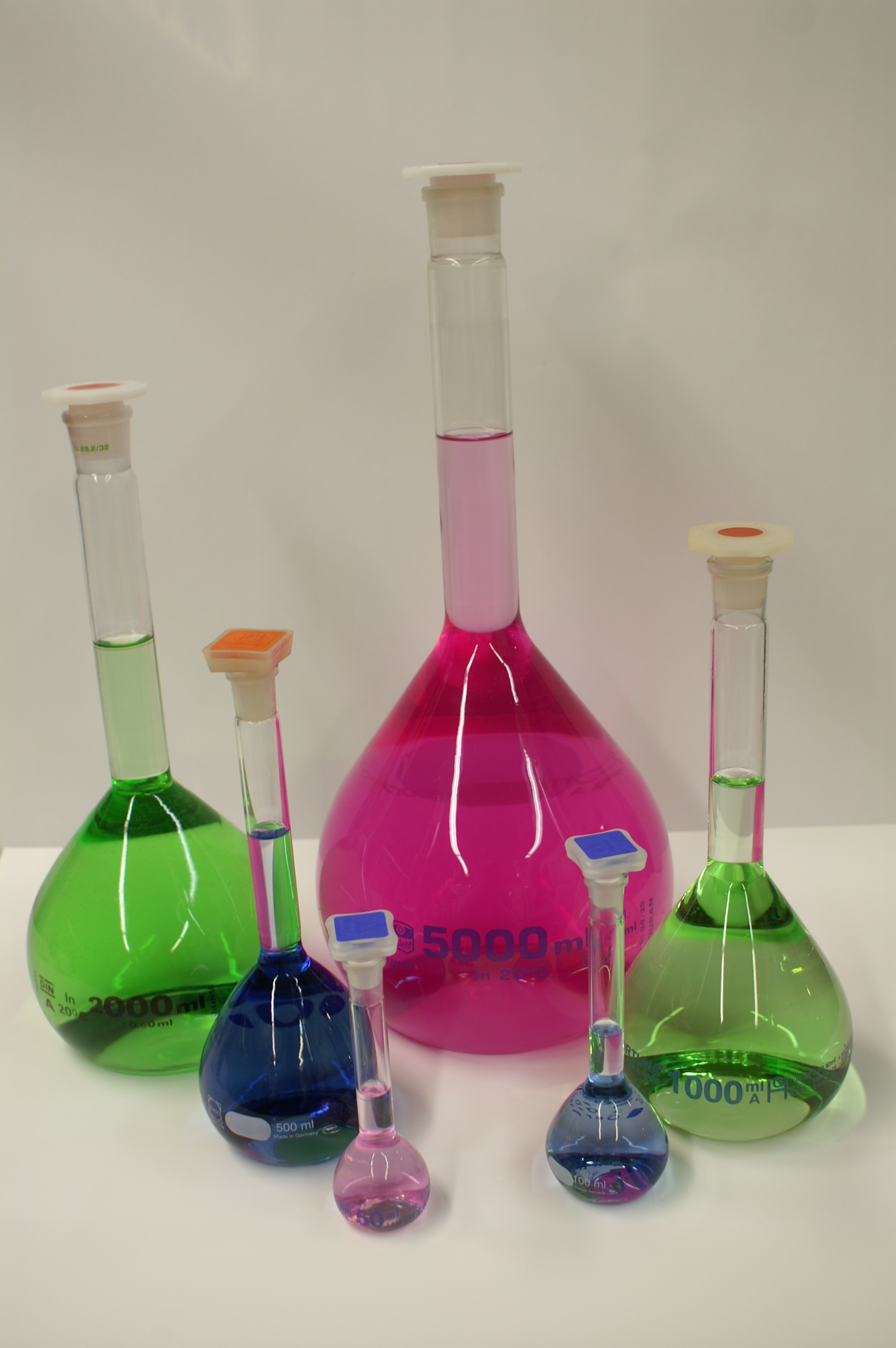 Auswahl von Messkolben mit verschiedenen Volumina